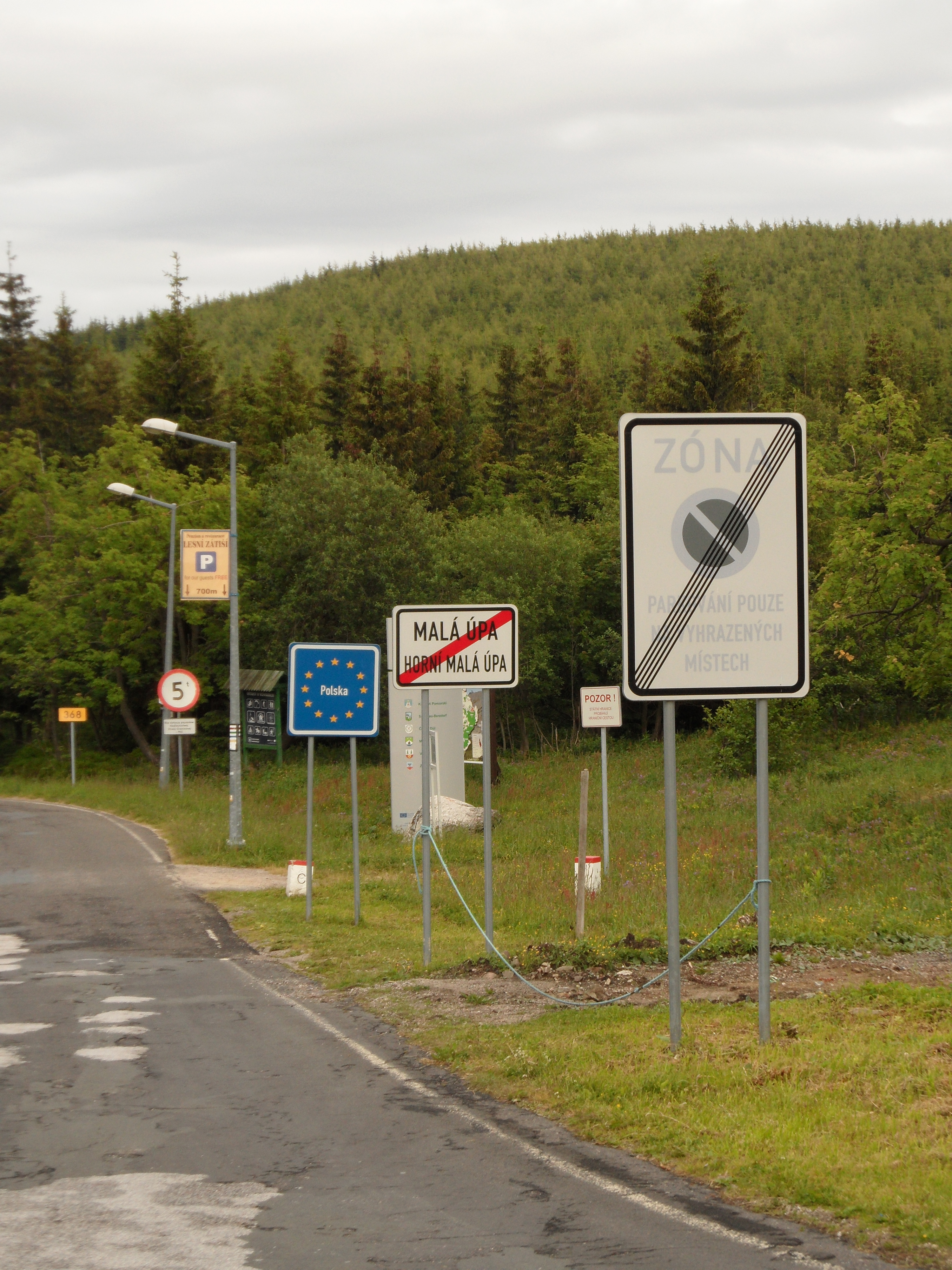 Przełęcz Okraj - Grenzbaudenpass